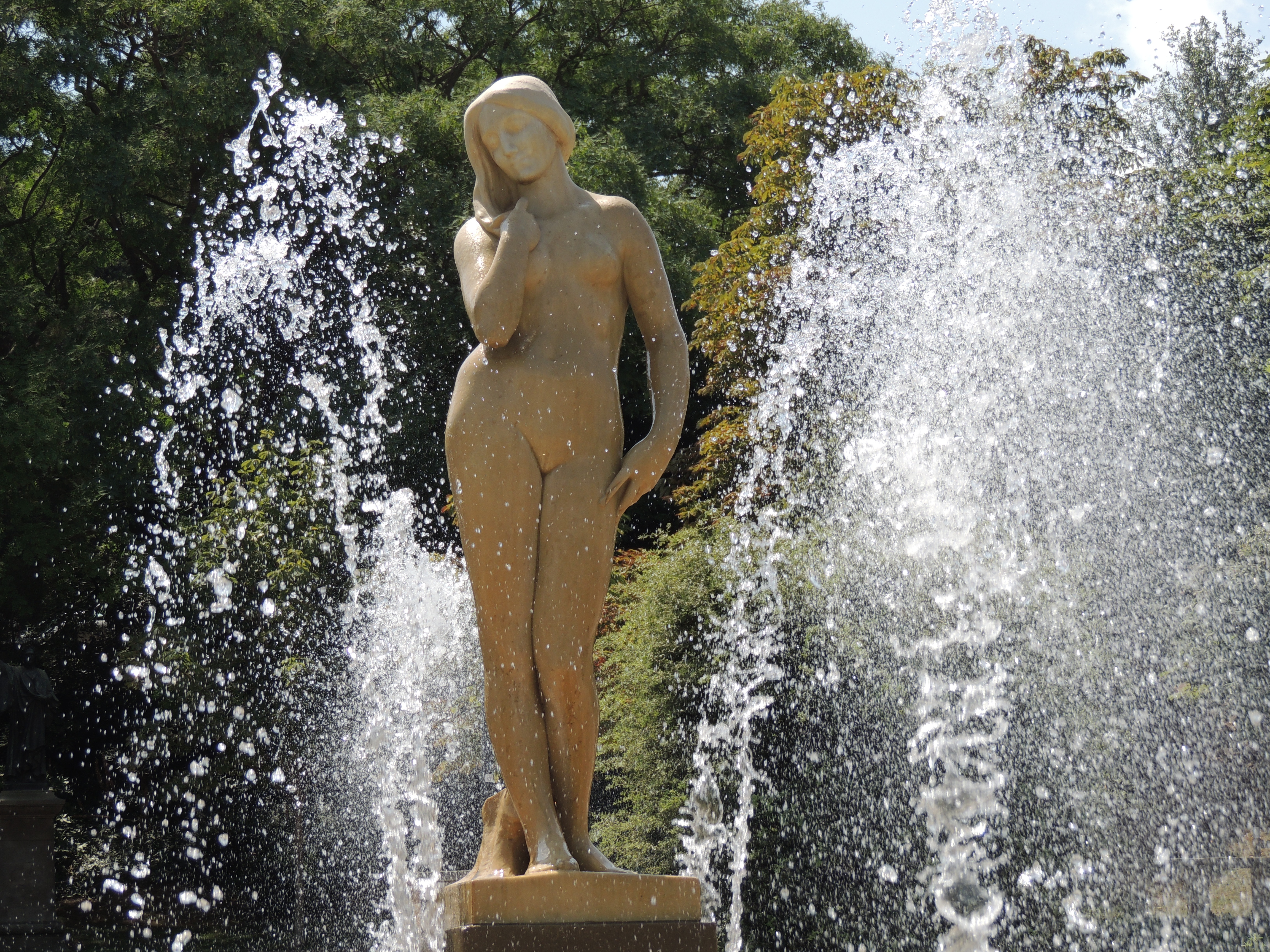 VENUS